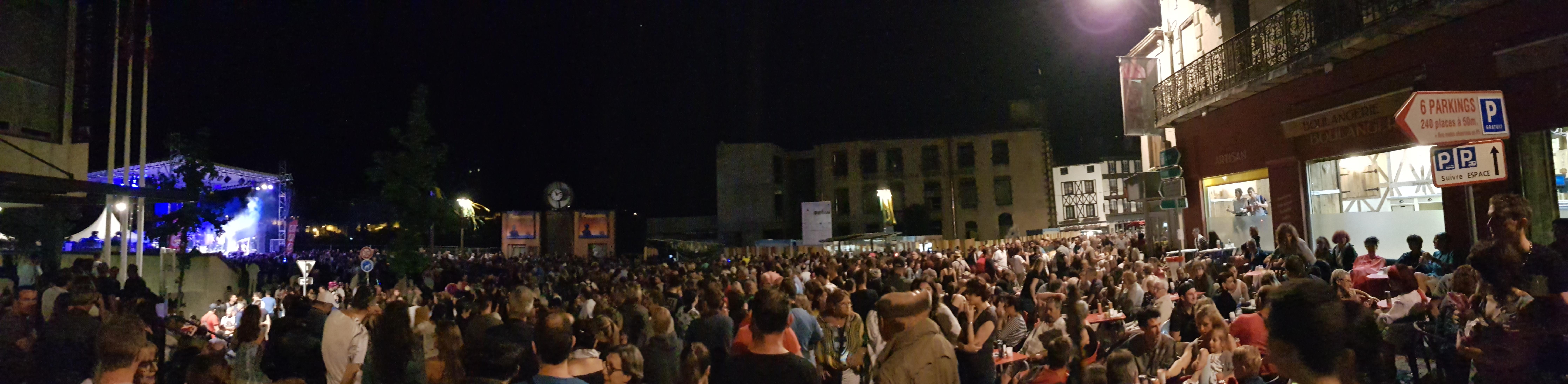 Pamparina 2019 : place Chastel de nuit